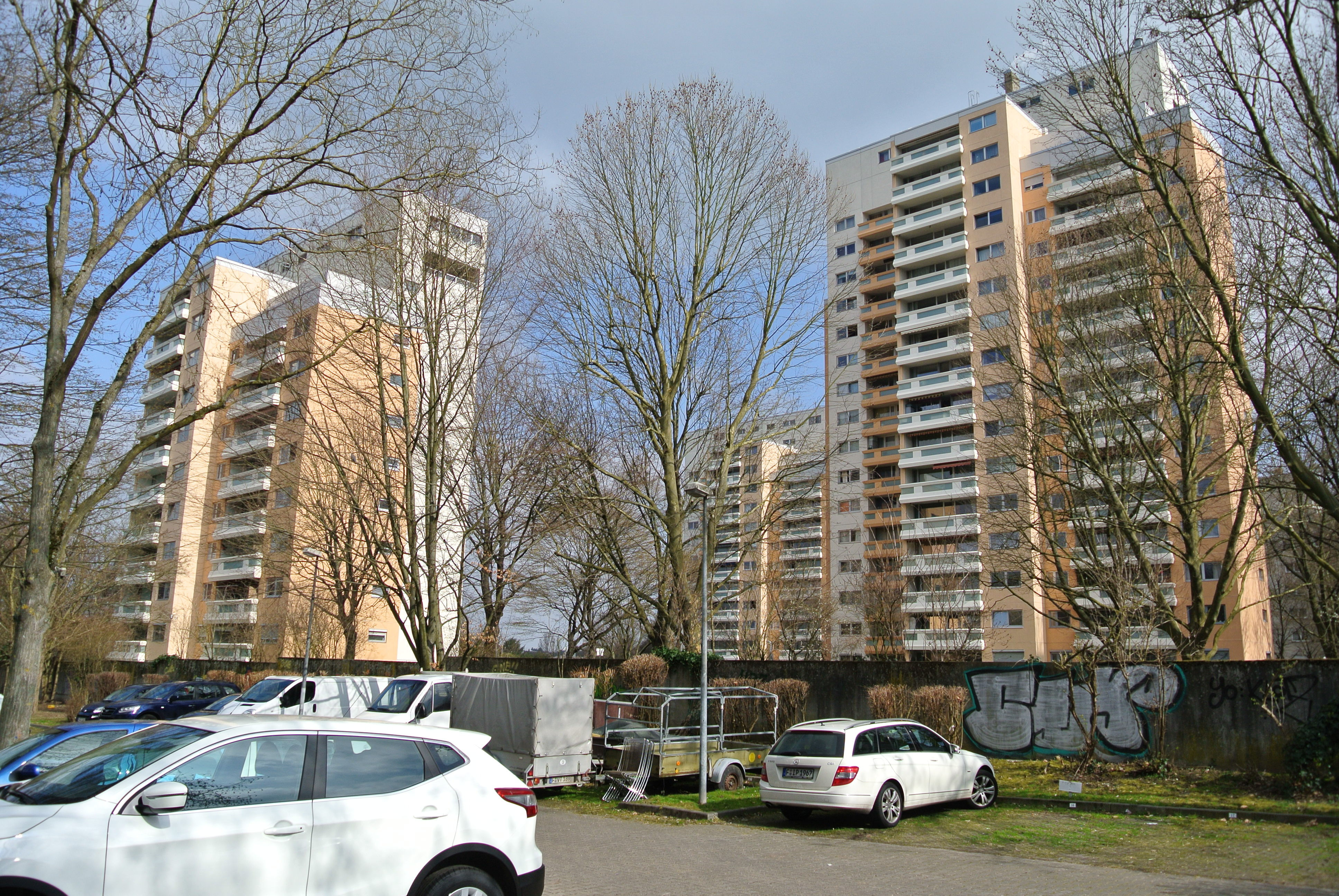 Siedlung Sigmund-Freud-Straße Frankfurt-Eckenheim Nordbereich SFS 103-107